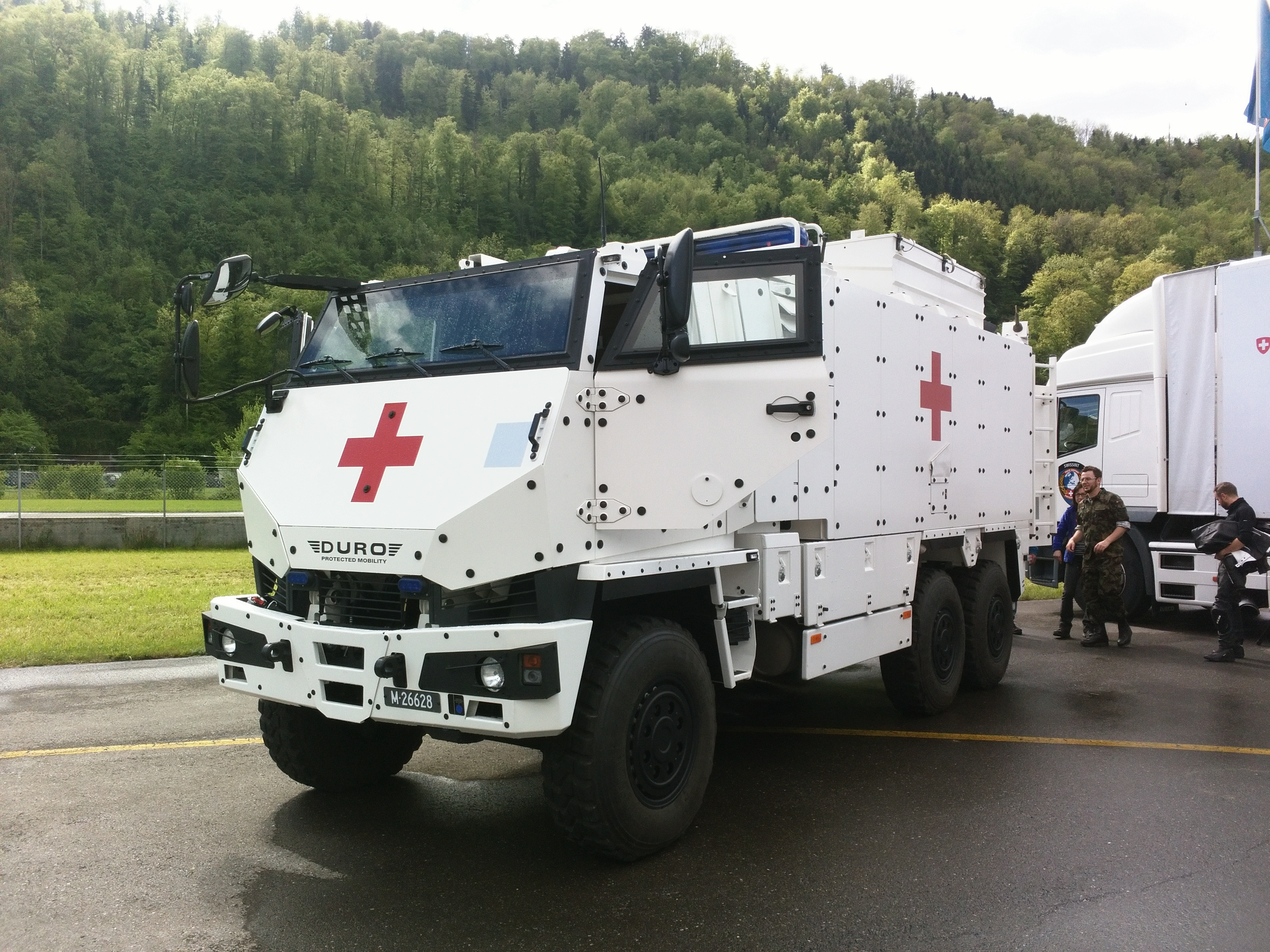 Mowag Swissint Ambulance